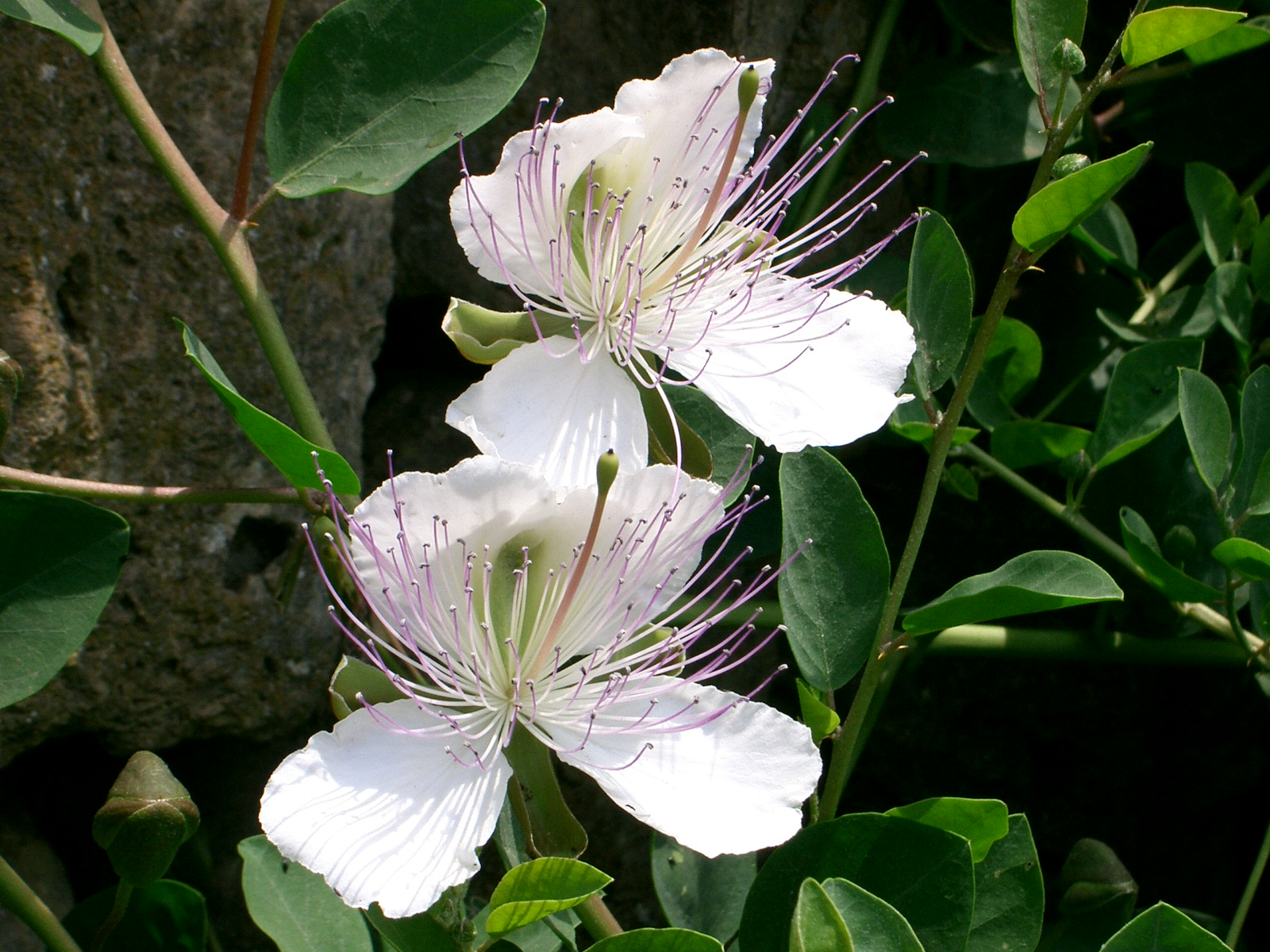 Flor de taperera (Capparis spinosa) a Son Carrió, Mallorca.